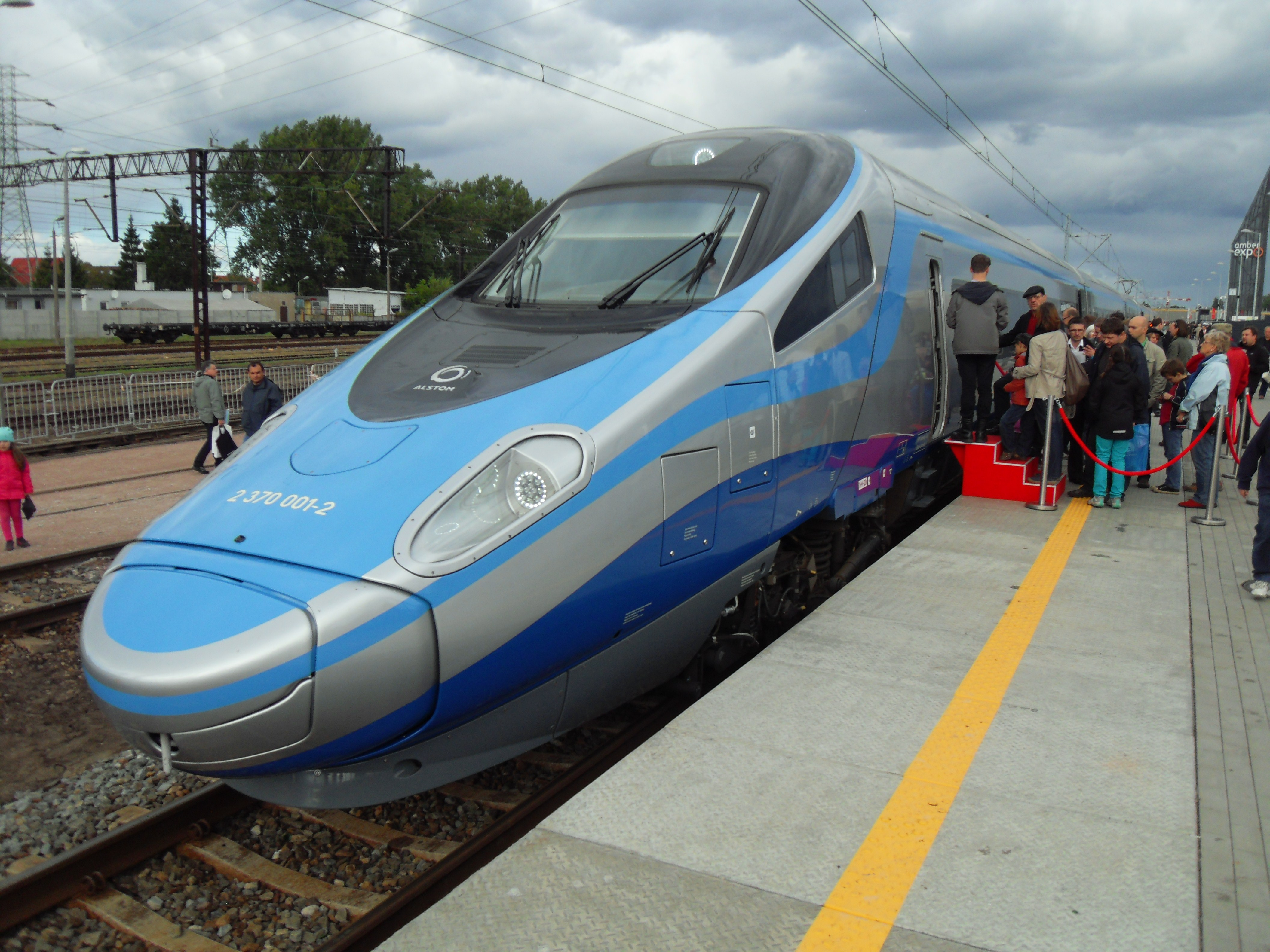 Gdańsk Letnica. TRAKO 2013, Pendolino.